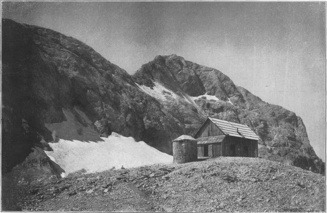 Triglavska koča s kapelico in Triglav.